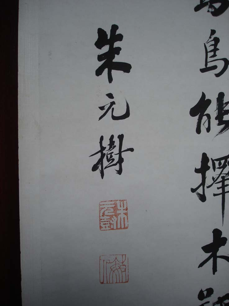 [清] 朱元树书法 墨 来自：朱元树书法——四明山论坛 原作为二维平面艺术（古画），作者逝世已逾百年，无特殊版权要求。